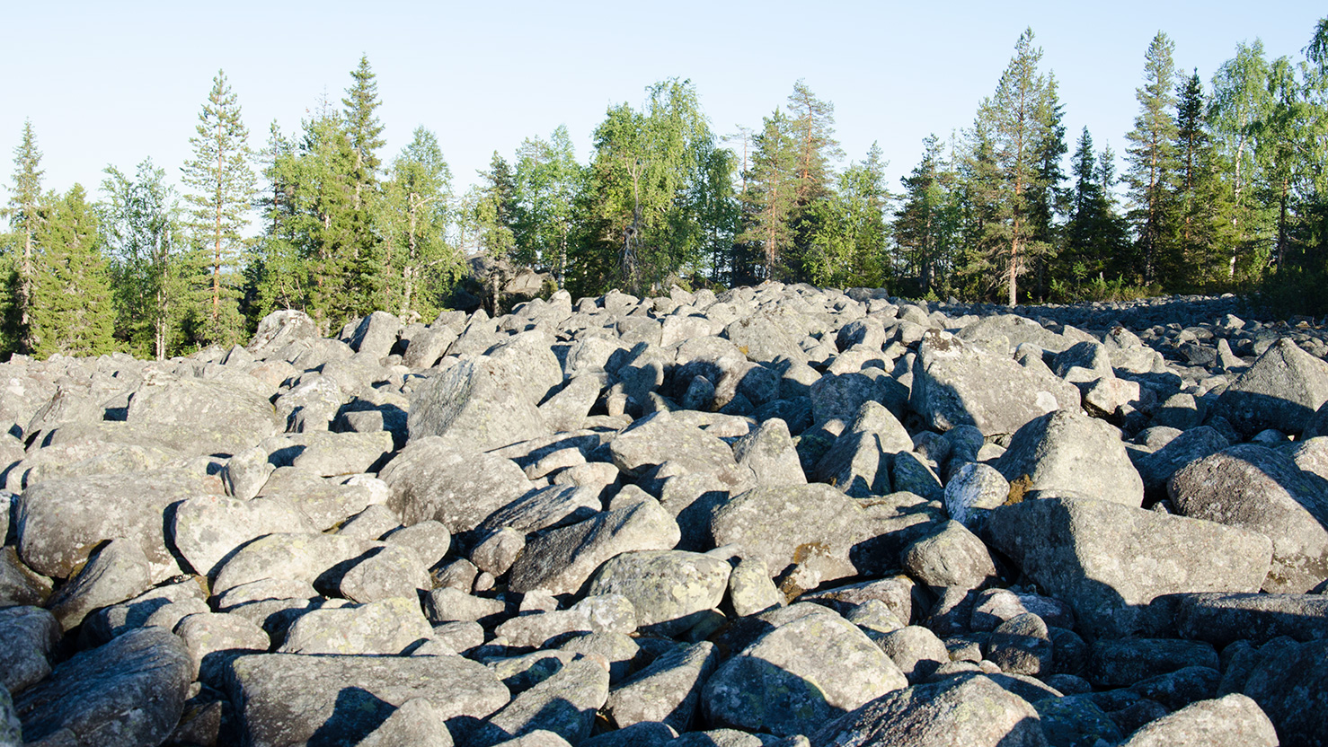 Keski-Penikalan laella on laaja pirunpelto